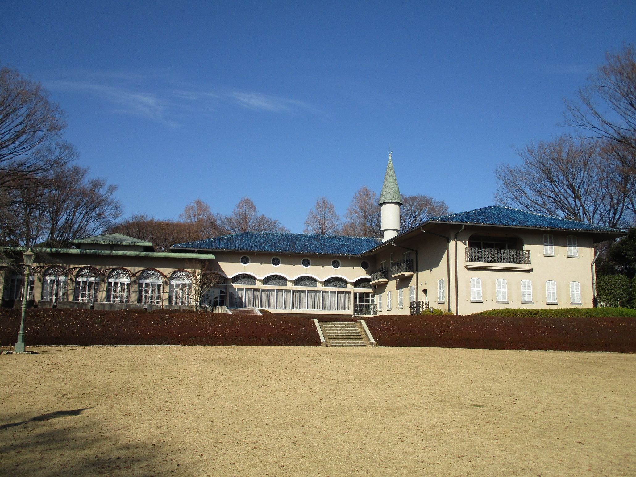 本人による撮影